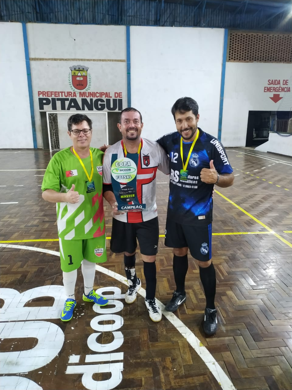 Equipe campeã da Copa Regional Sicoob Credicoop 2020 de Futsal em Pitangui. Goleiros.